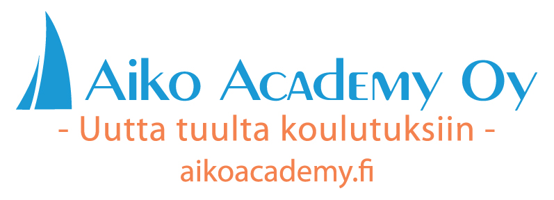 Aiko Academy Oy, logo, jpg, 150dpi